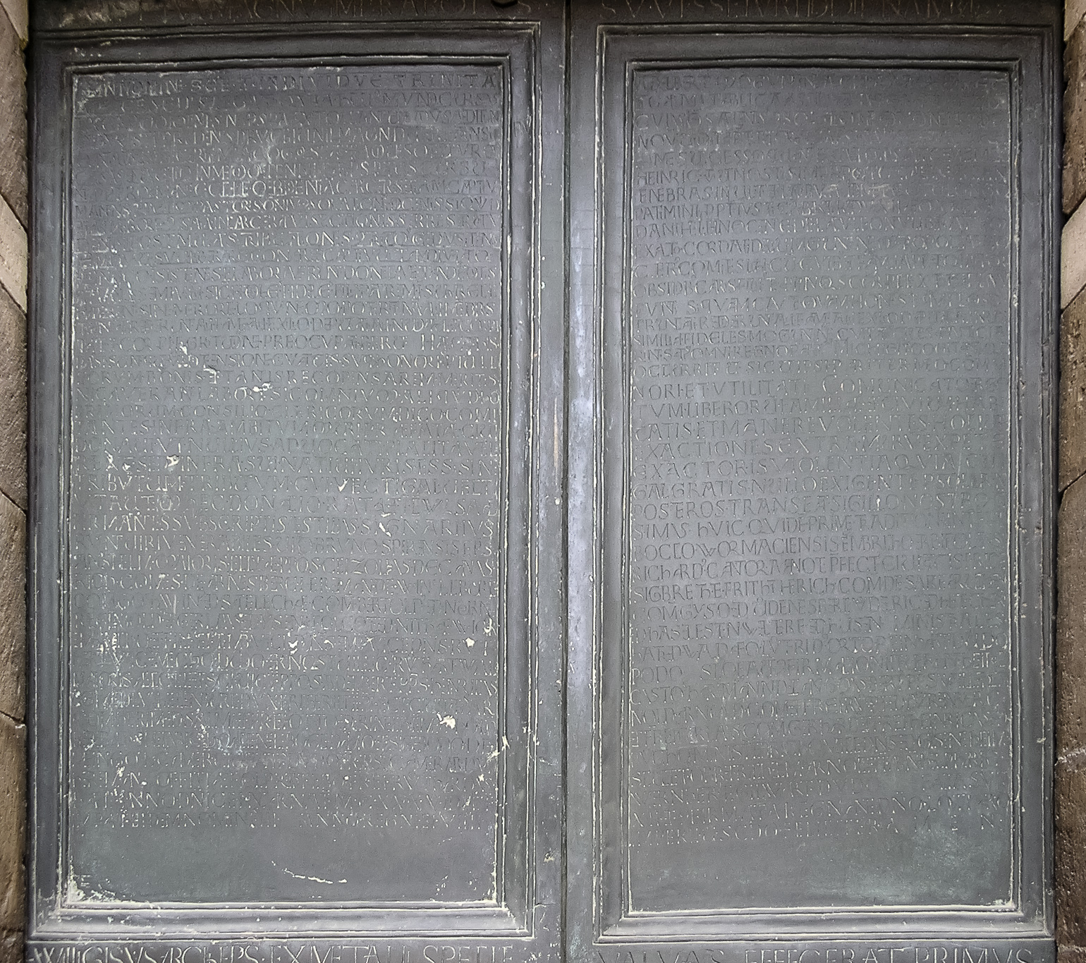 Bildmotiv: Das Freiheitsprivileg Erzbischof Adalberts I. v. Saarbrücken für die Mainzer Bürgerschaft, eingegraben im die Bronzetüren des Willigis (heute Marktportal)